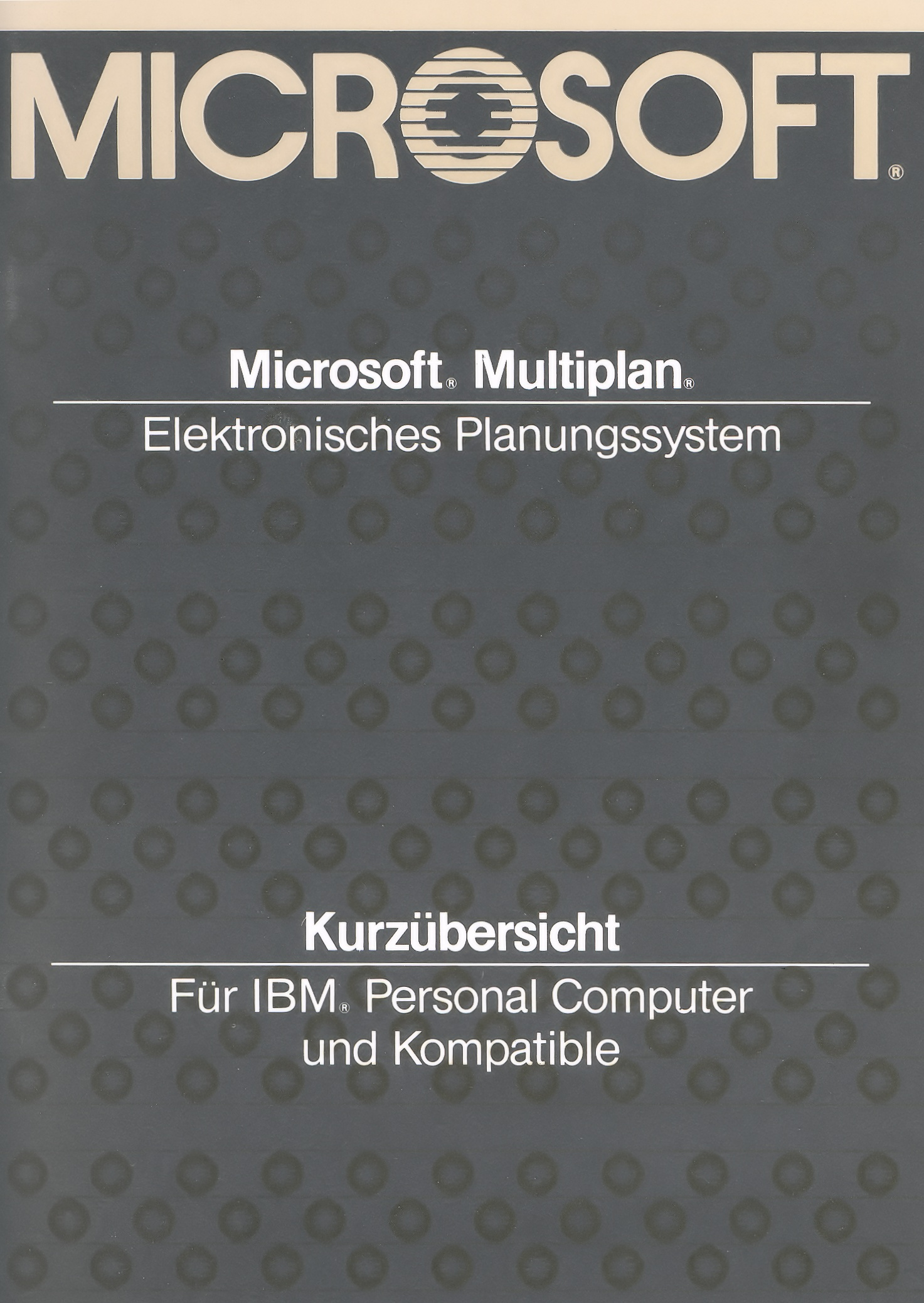 Deckblatt der 32seitigen Kurzübersicht der Tabellenkalkulation MULTIPLAN für MS-DOS/IBM-kompatible PCs aus dem Jahr 1982; Hinweis: Microsoft, Multiplan und MS-DOS sind eingetragene Warenzeichen der MS Corporation